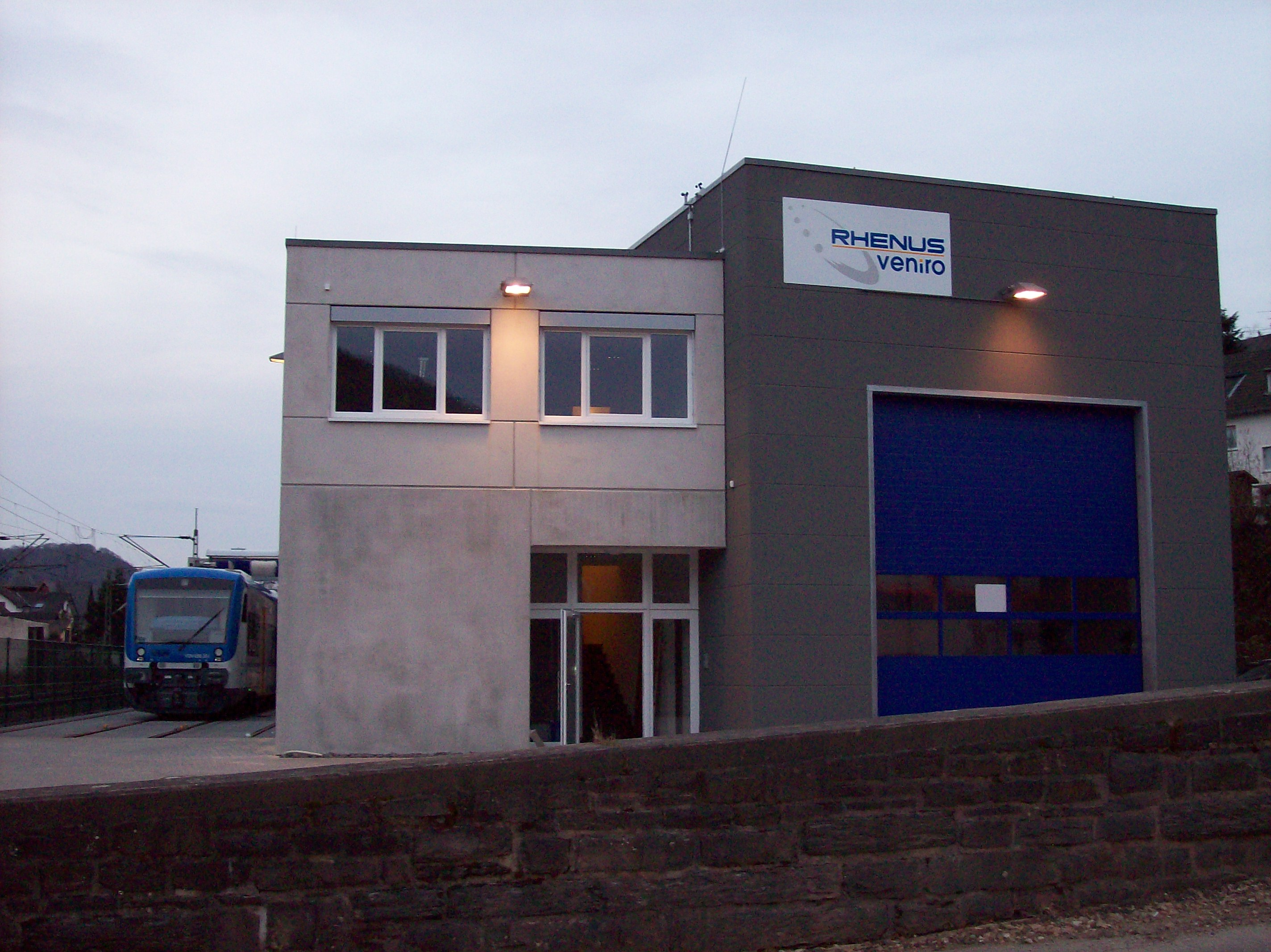 Reparatur- und Waschanlage für Züge der Firma Rhenus Veniro in Boppard